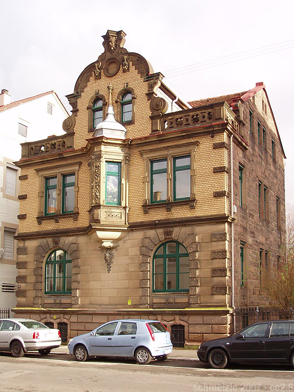 Haus Hubmann in Heilbronn, denkmalgeschütztes Wohngebäude im Stil der Neorenaissance